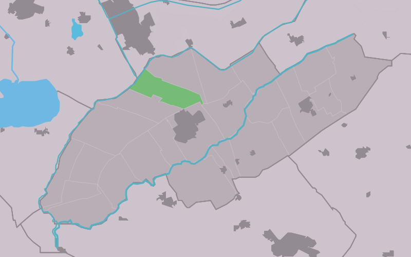 Kaartsje fan himrik fan Nijeholtwâlde